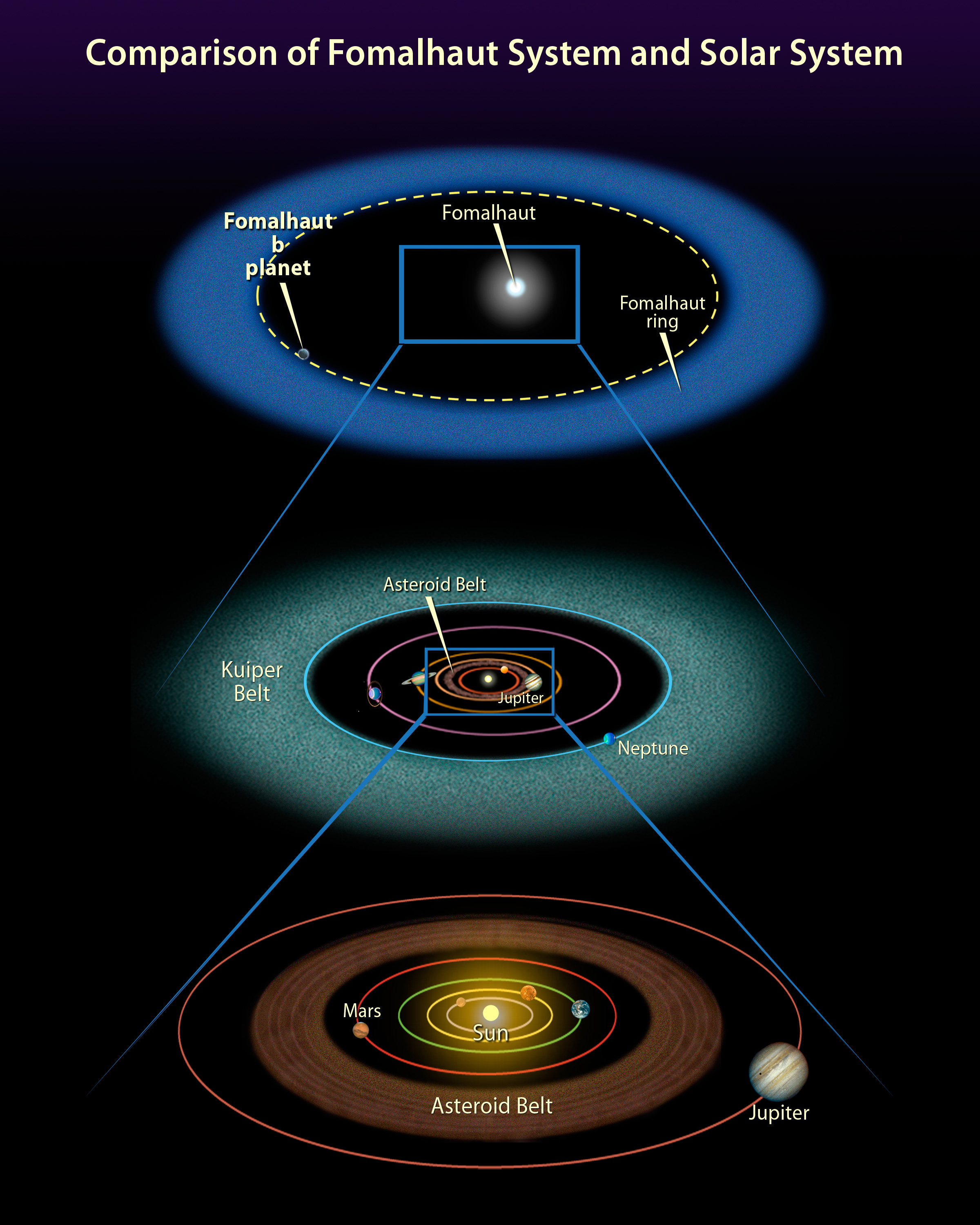 Fomalhaut, HD 216956, Fomalhaut b